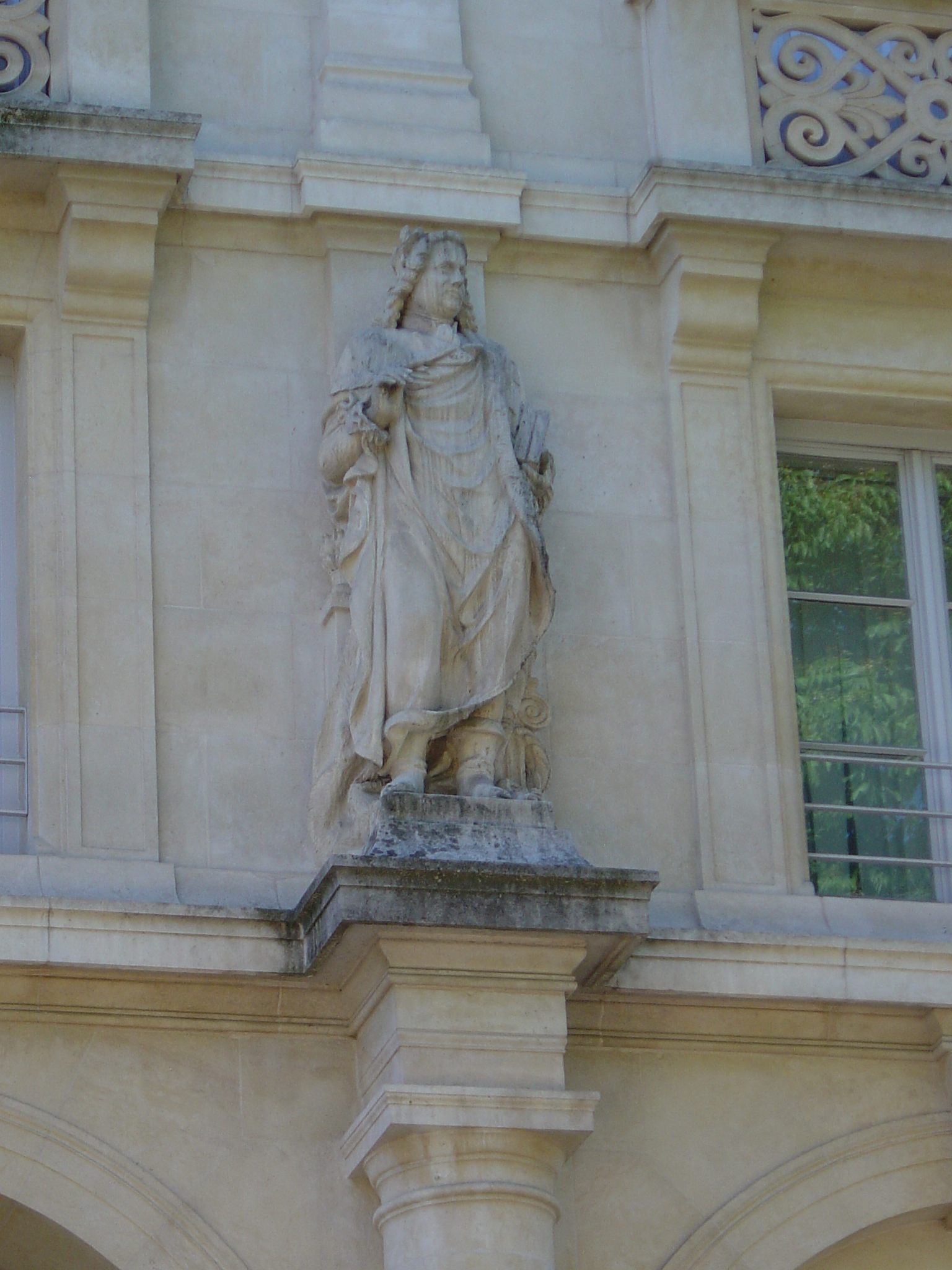 Façade du palais de l'Académie (aujourd'hui palais de l'Université), cours Léopold, Nancy. Statue de Stanislas par Giorné Viard.